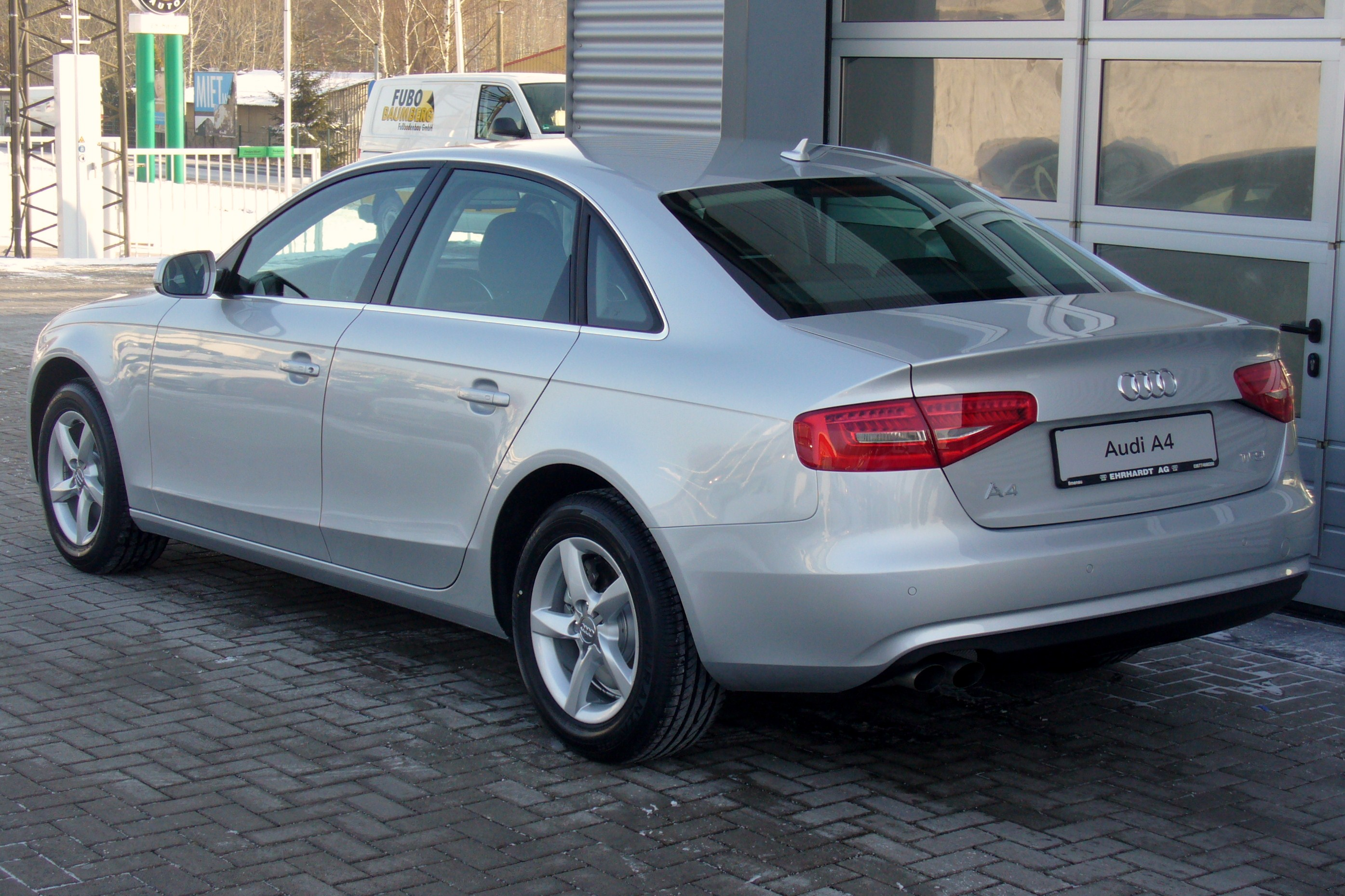 Audi A4 B8 Facelift